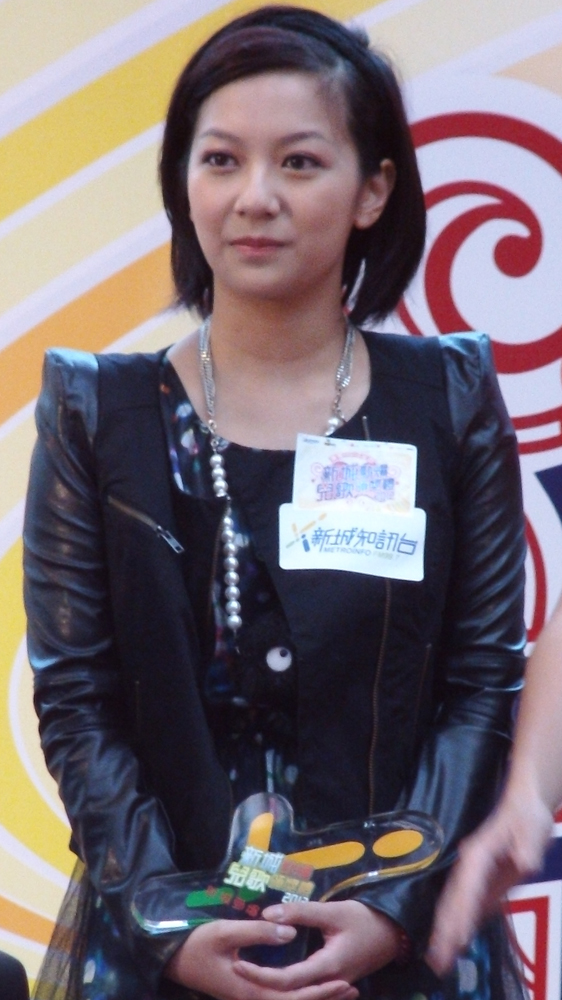 中文（香港）: 何雁詩的樣子